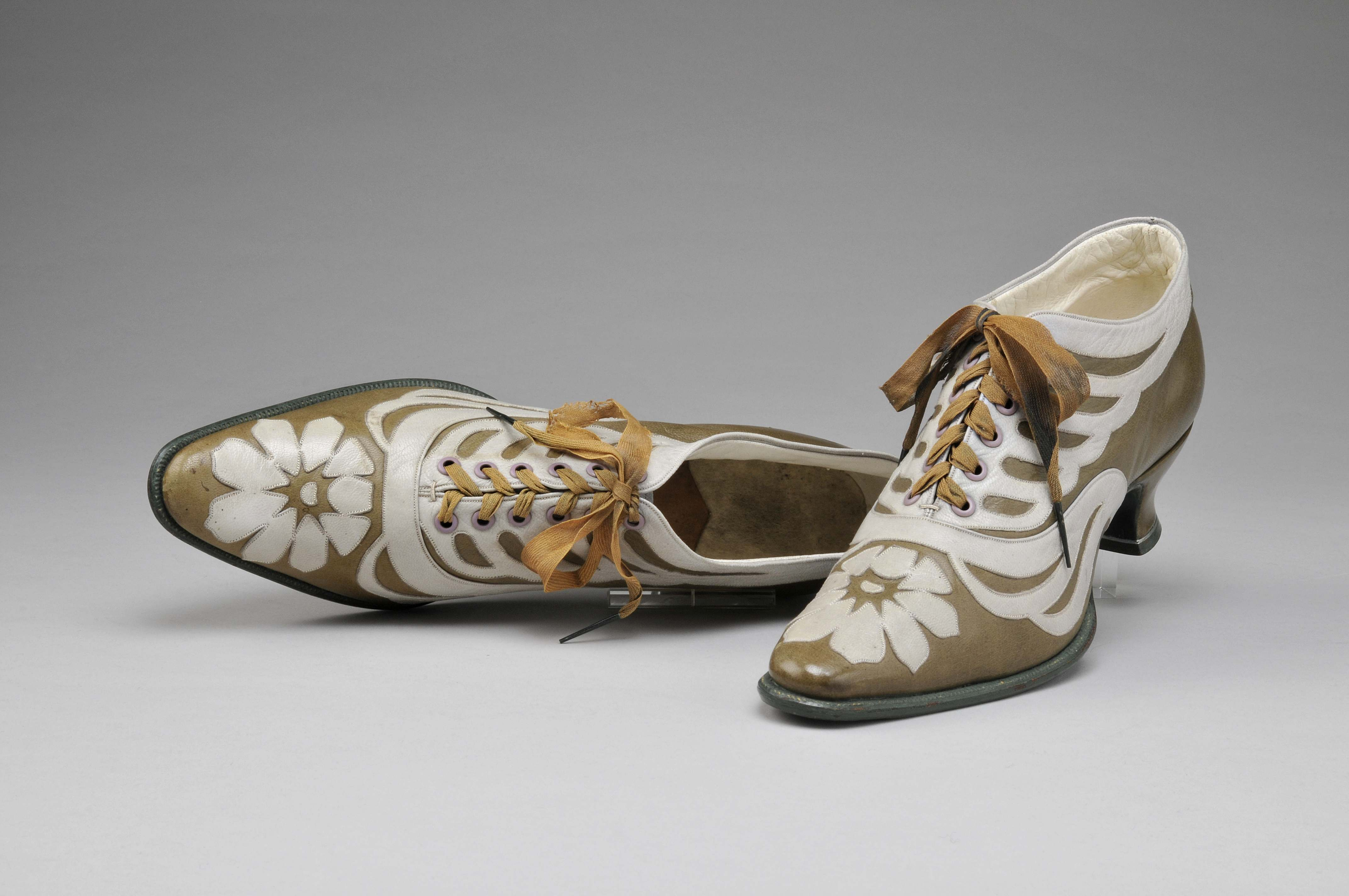 Damenschnürpumps, Darmstadt, um 1900 © DLM/C. Perl-Appl